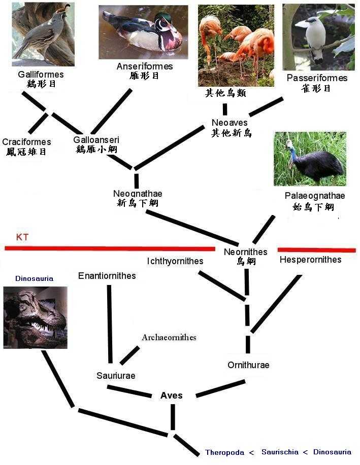 荷蘭文維基的圖改來的 是要給zh:鳥類DNA分類系統詞條使用的，請見荷蘭文維基另外日本維基也是用這張